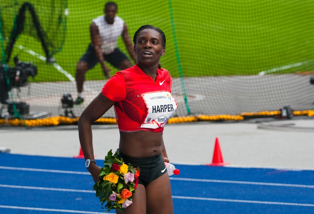 Dawn Harper, 100m Hürden